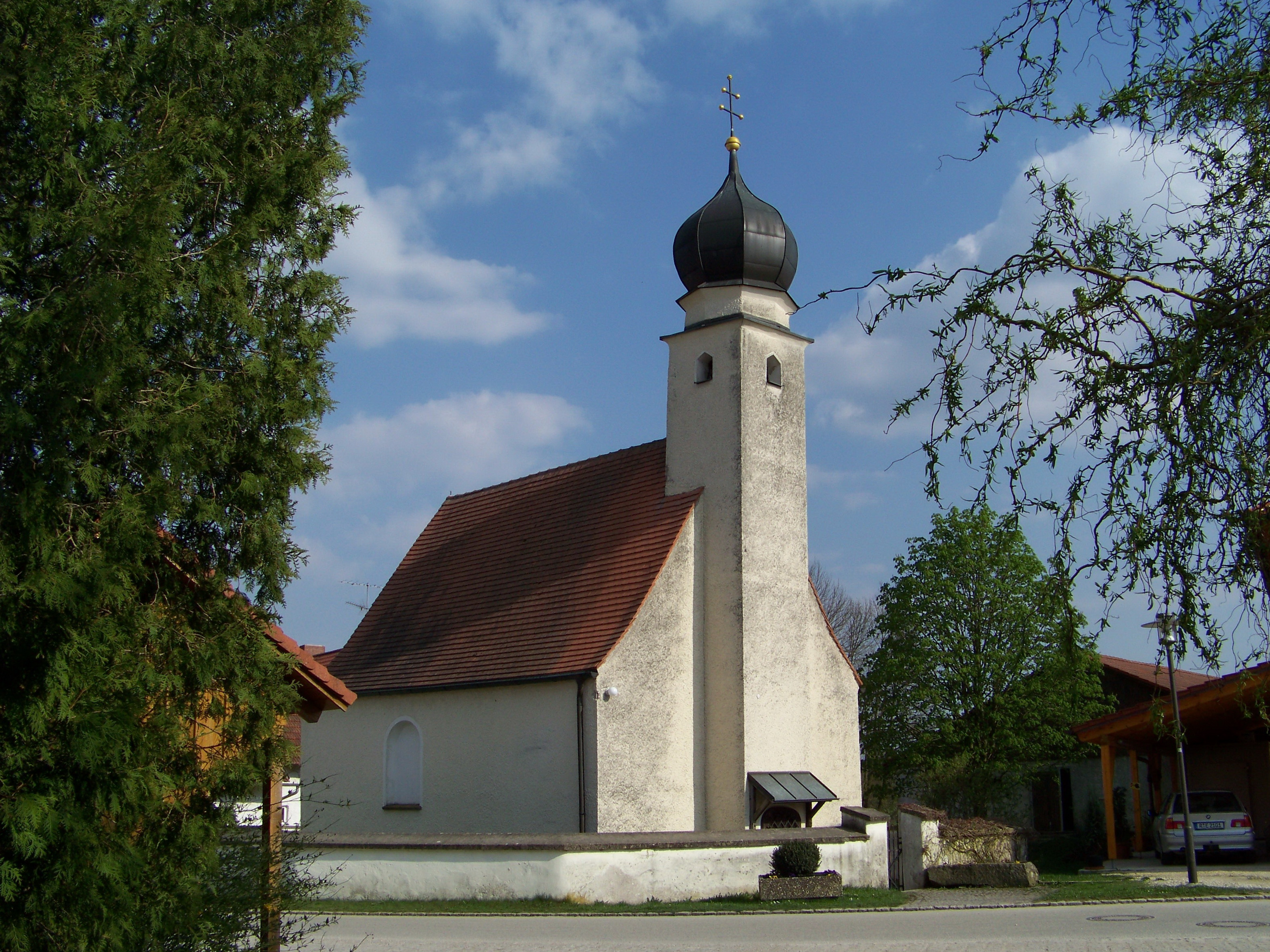 Aufhausen in der Oberpfalz. Irnkofen. Katholische Nebenkirche St. Margareta, Saalbau mit eingezogener Apsis und Fassadenturm mit Zwiebelhaube, Apsis romanisch, Langhaus 1. Hälfte 17. Jahrhundert; mit Ausstattung; Friedhofsmauer, wohl mittelalterlich.